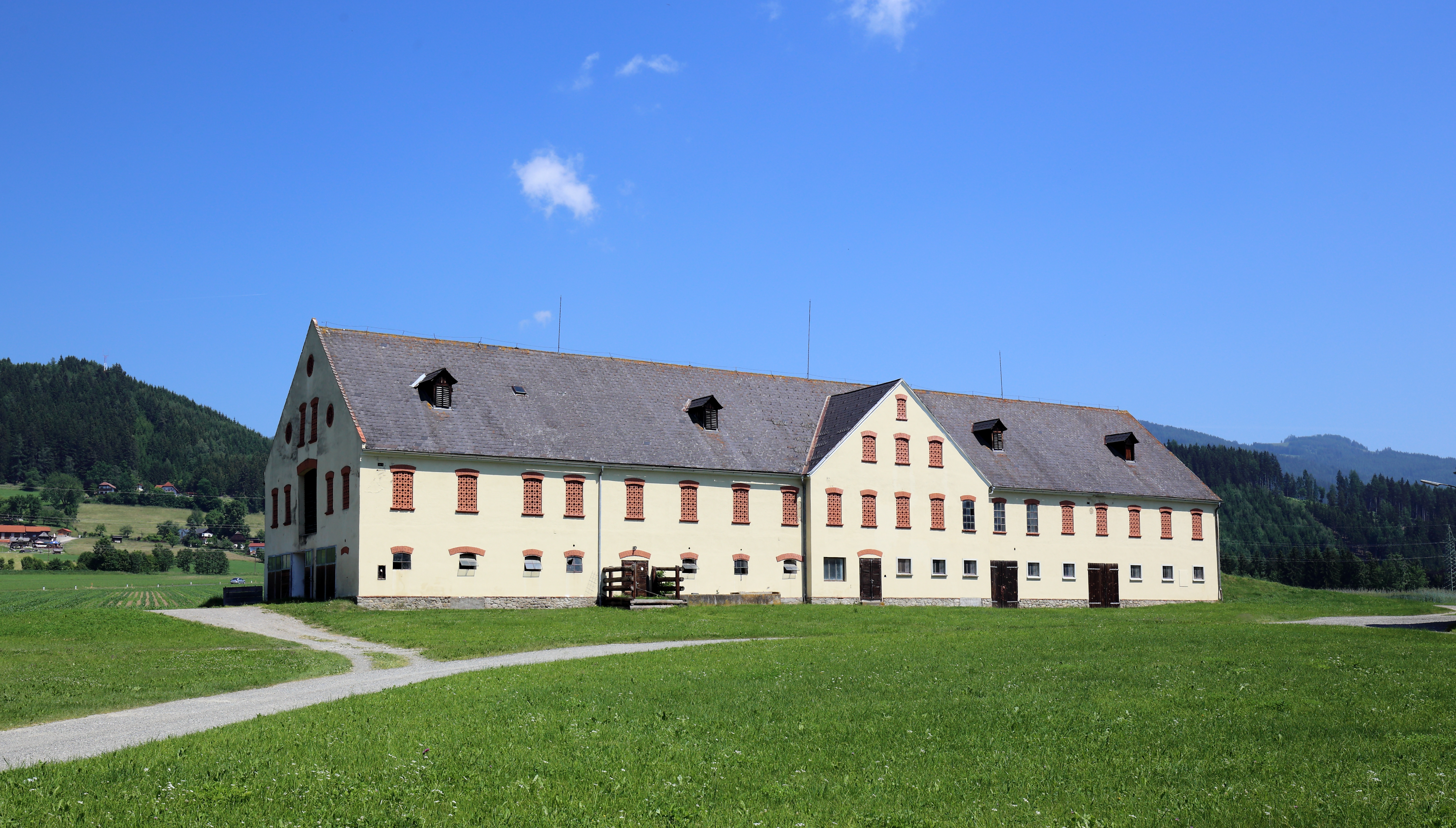 Das Wirtschaftsgebäude vom Schloss Prankh in der österreichischen Gemeinde Sankt Marein-Feistritz im steirischen Bezirk Murtal.